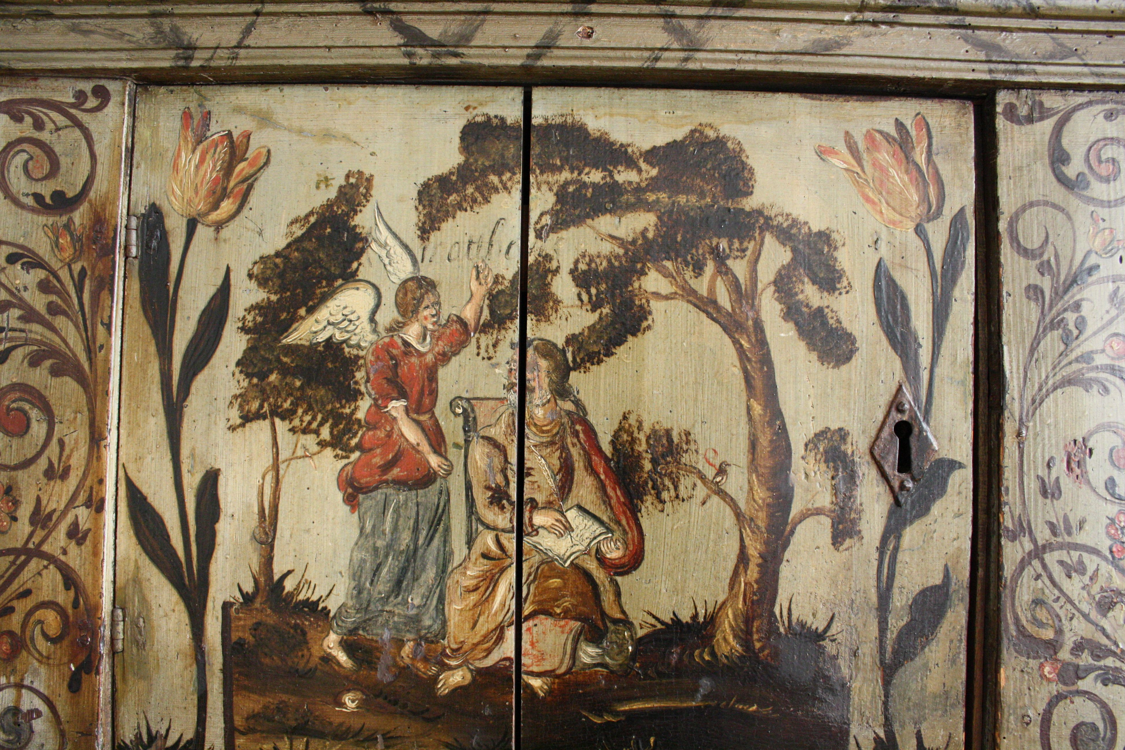 Hindelooper kamer Fries Museum